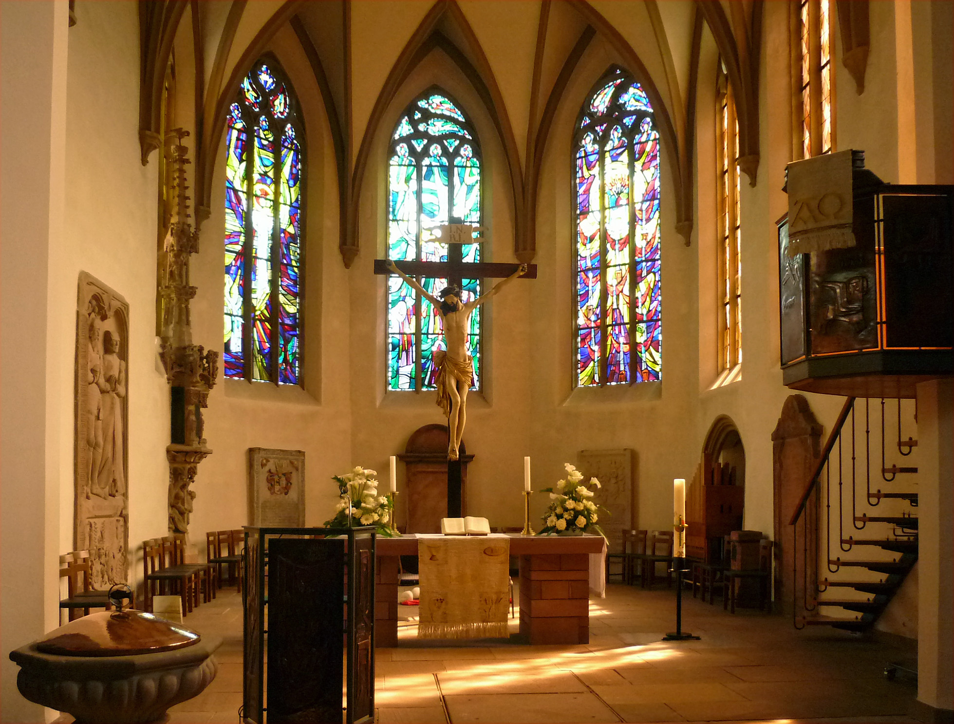 Evang. Jakobskirche in Gernsbach im Murgtal, Lkr. Rastatt (Baden)